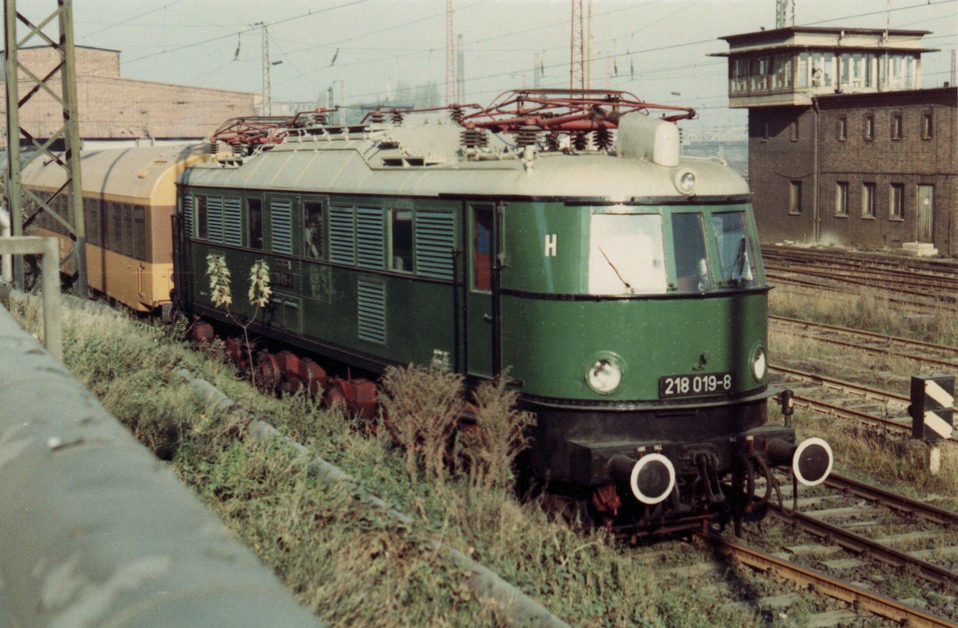 Elektrolok der Baureihe E 18 der Deutschen Reichsbahn vor früherer VES-M Halle (Saale) der Deutschen Reichsbahn für Schnellfahrversuchseinsätze bis 180 km/h.